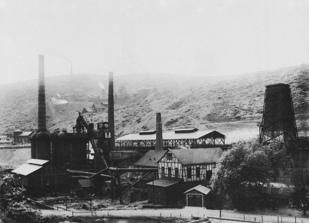 Die Gosenbacher Hütte in Gosenbach im Siegerland.